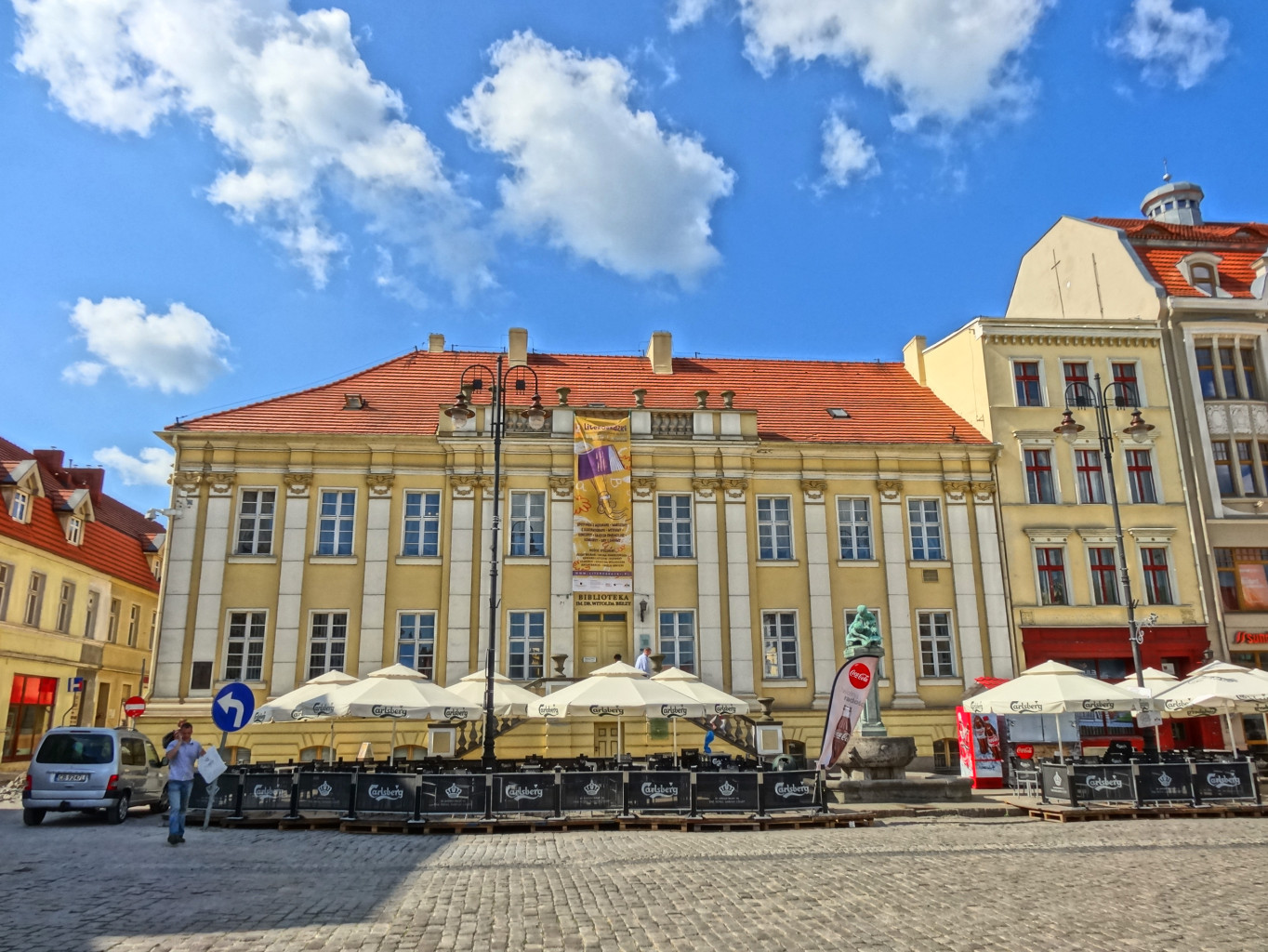 Wojewódzka i Miejska Biblioteka Publiczna w Bydgoszczy, budynek przy Starym Rynku